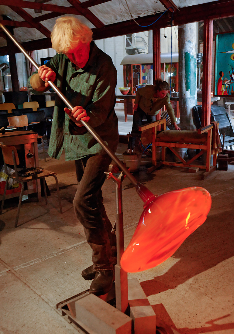 Johan de Vries tijdens het glasblazen.